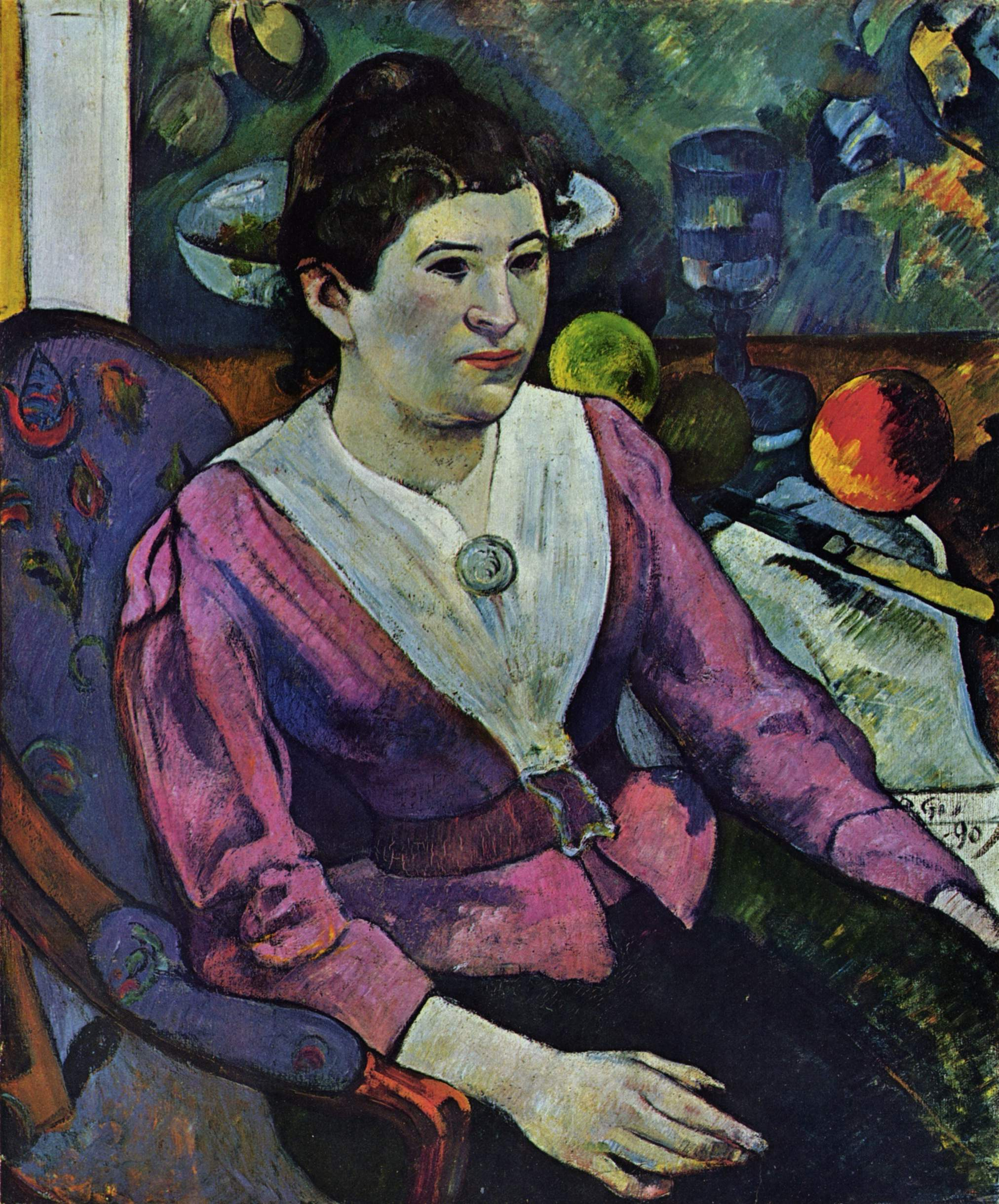 Depicted person: Marie "Lagadu" Derrien